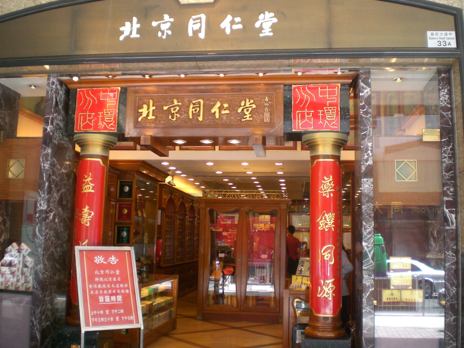 Tong Ren Tang, 北京同仁堂, Queen's Road, 皇后大道中33號zh:萬邦行, Hong Kong